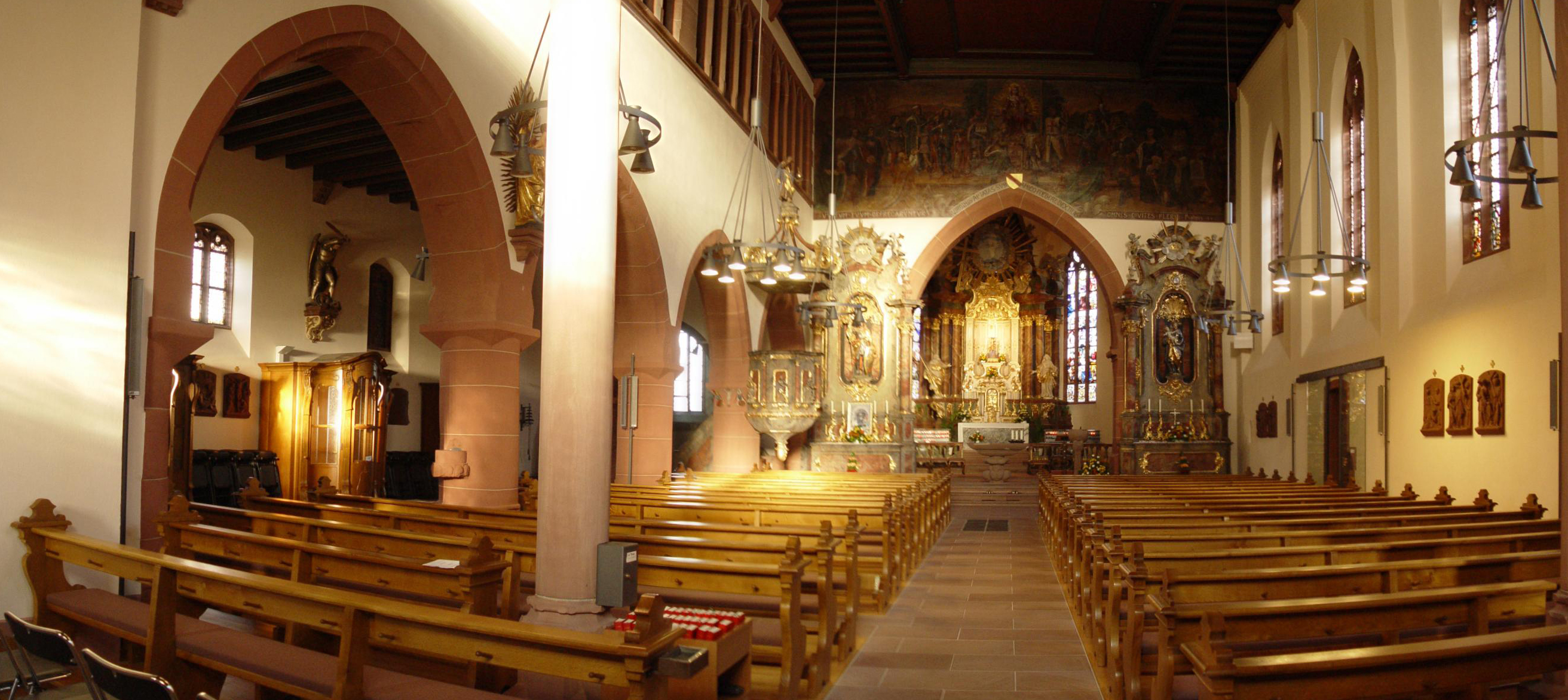 Fotografiert von Martin Dürrschnabel. Innenansicht der Kirche Maria Bickesheim in Durmersheim, Deutschland.